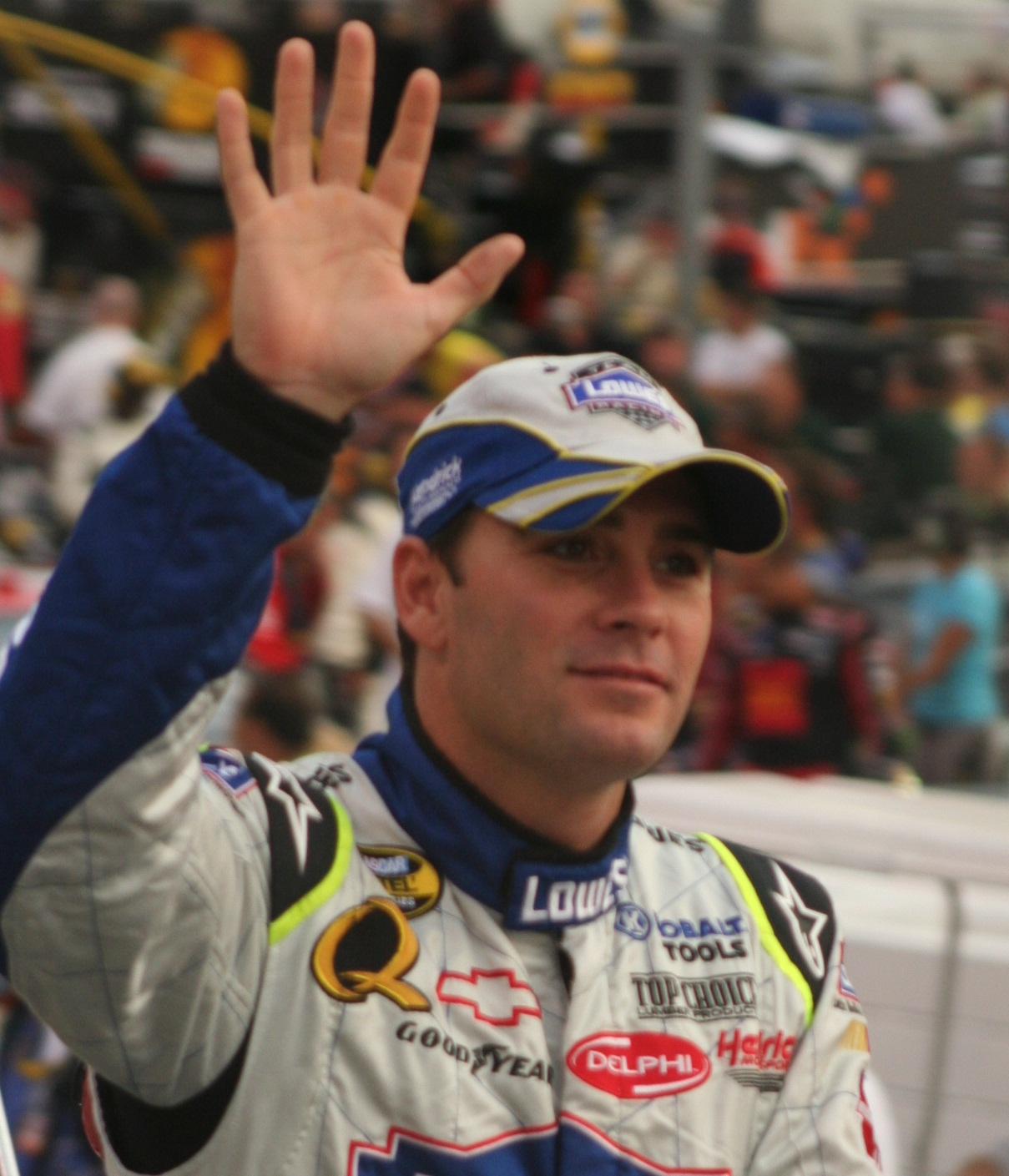 NASCAR driver Jimmie Johnson in August 2007